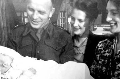 Рождение ребёнка в польской зоне оккупации Германии